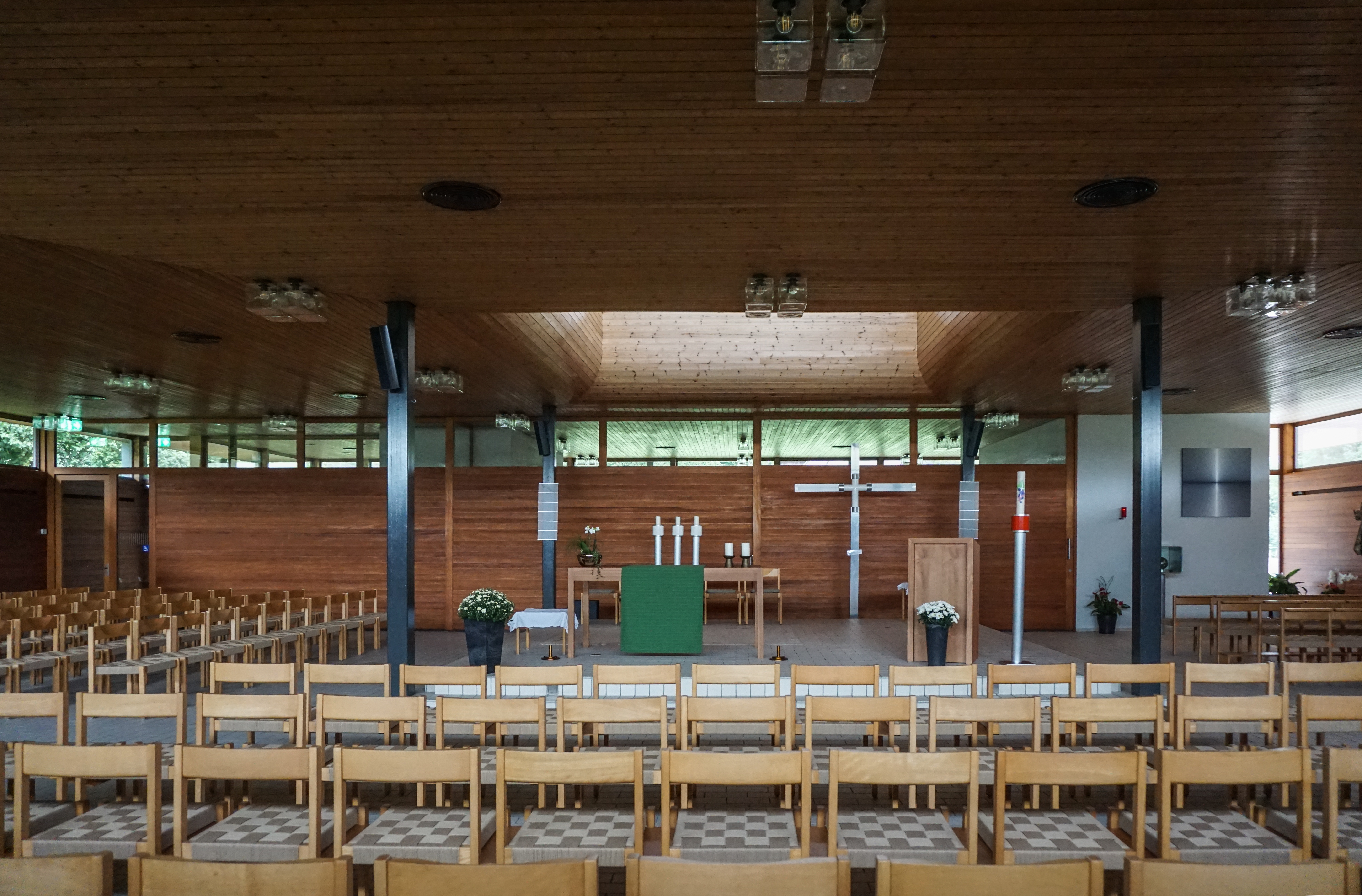 Kirchenraum der Johanneskirche von Bremgarten bei Bern